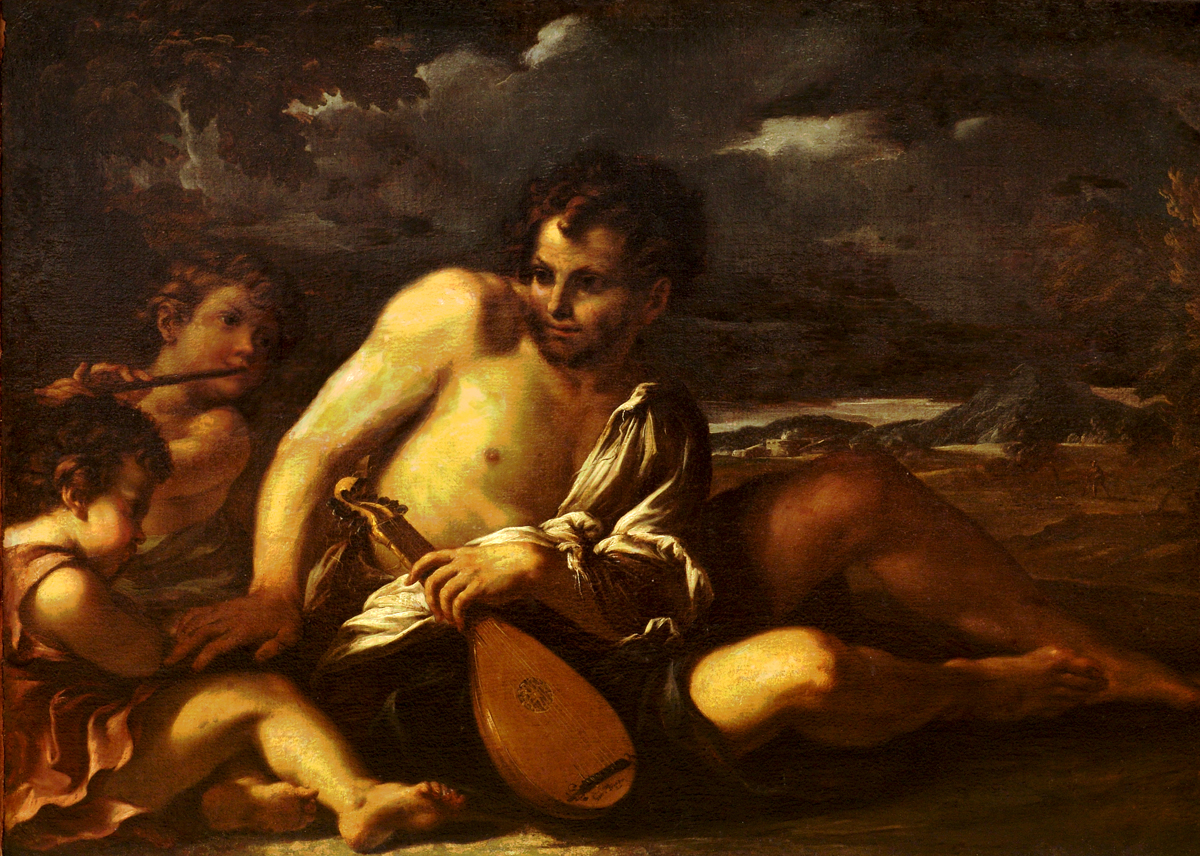 Палатно, алей. 97,5х136.